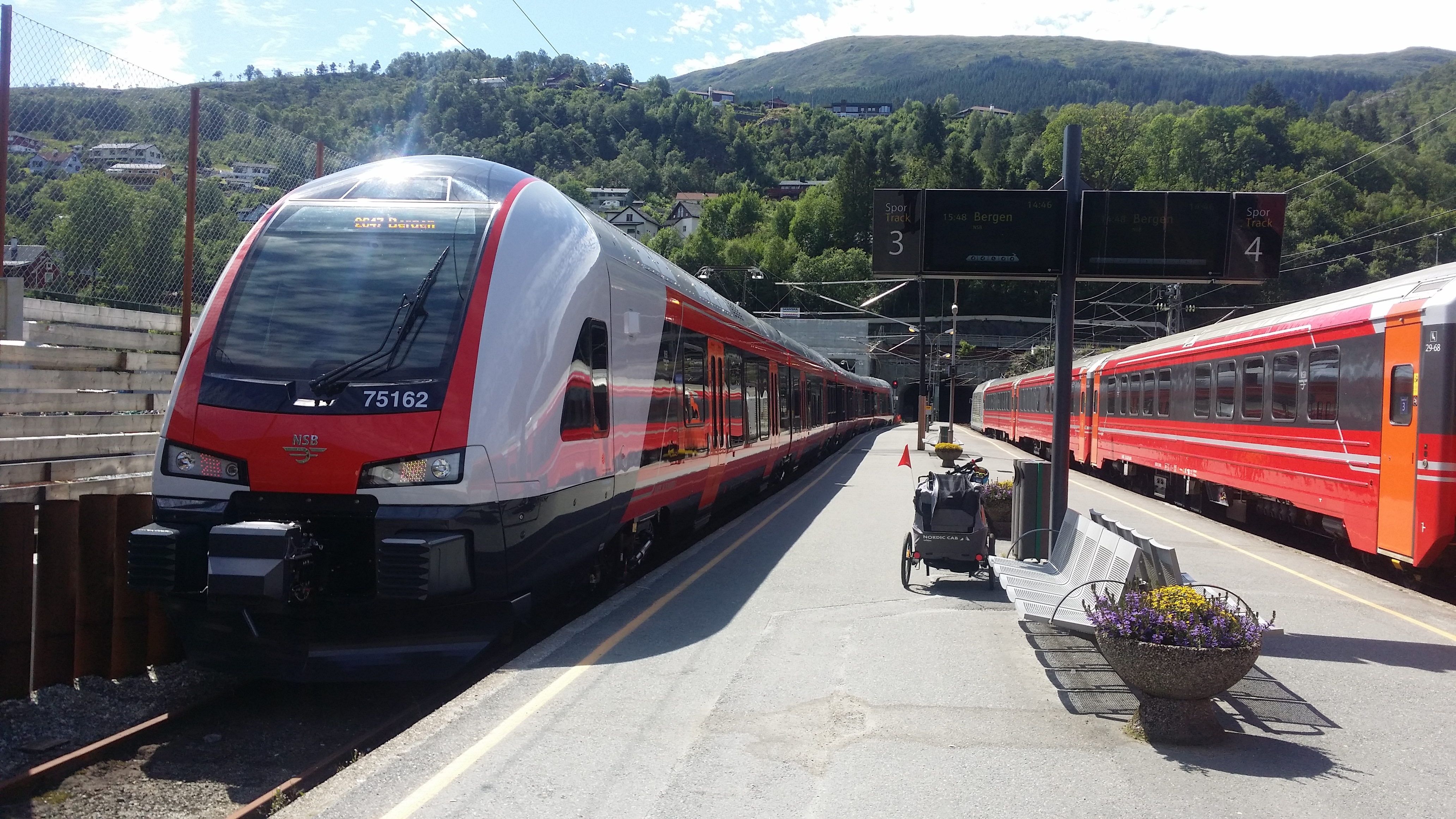 Splitter nytt 75-62 på Arna st. Første FLIRT til Bergen.